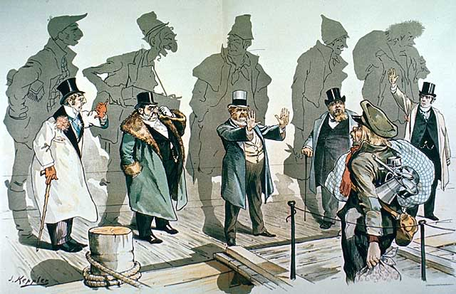 Carricature de Joseph Keppler, parue dans Puck, 11 janvier 1893